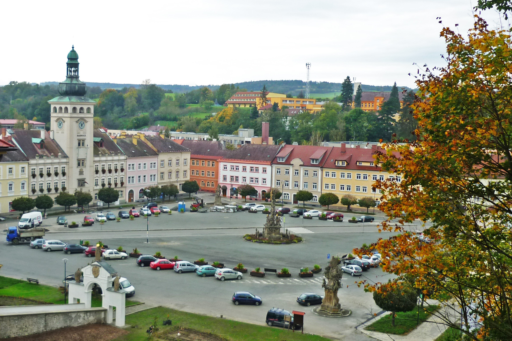 Blick auf Rathaus und Dreifaltigkeitssäule (Pestsäule) am Comeniusplatz in Fulnek